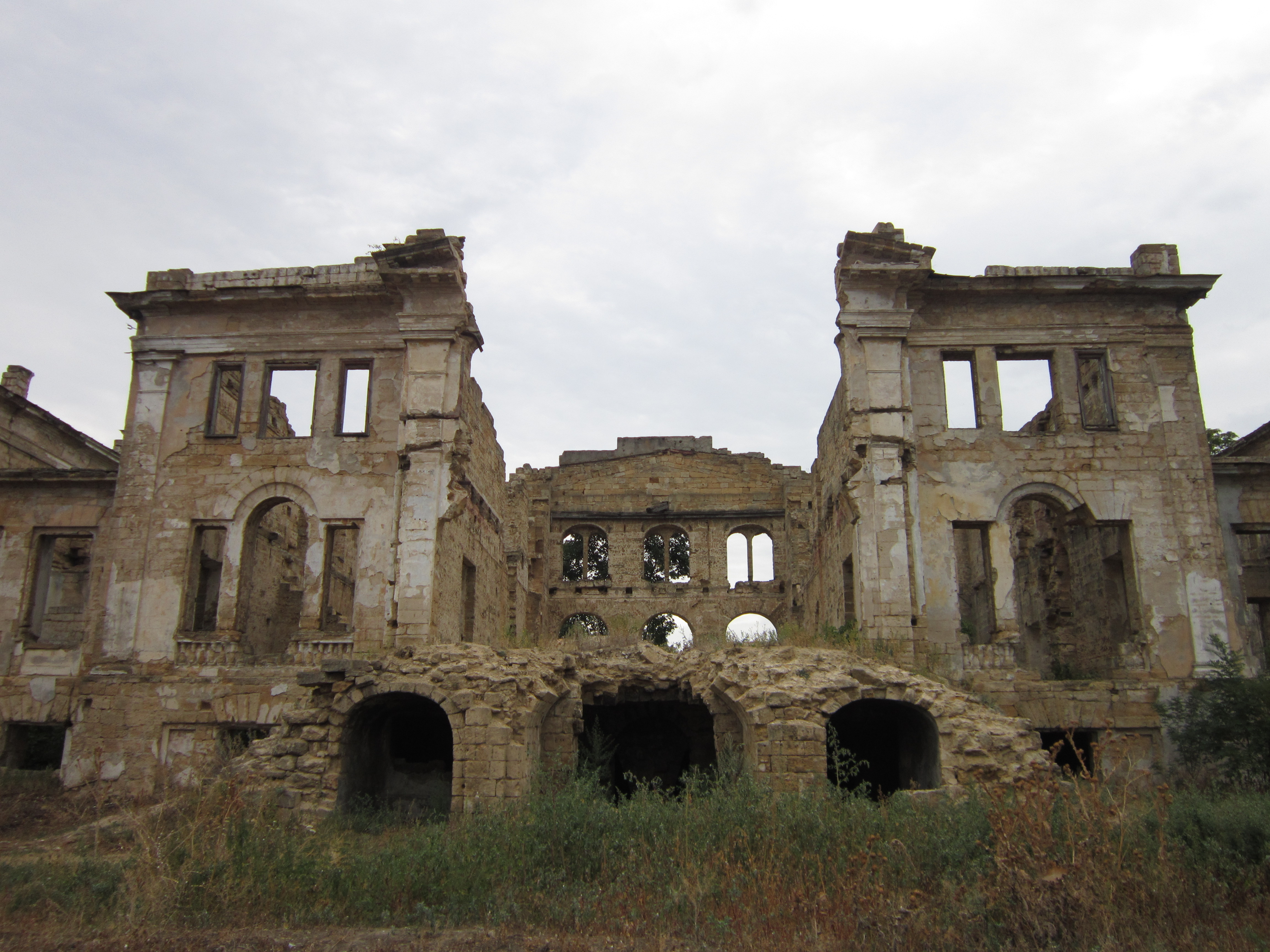 Садиба Дубецького, с. Василівка, Одеська область.